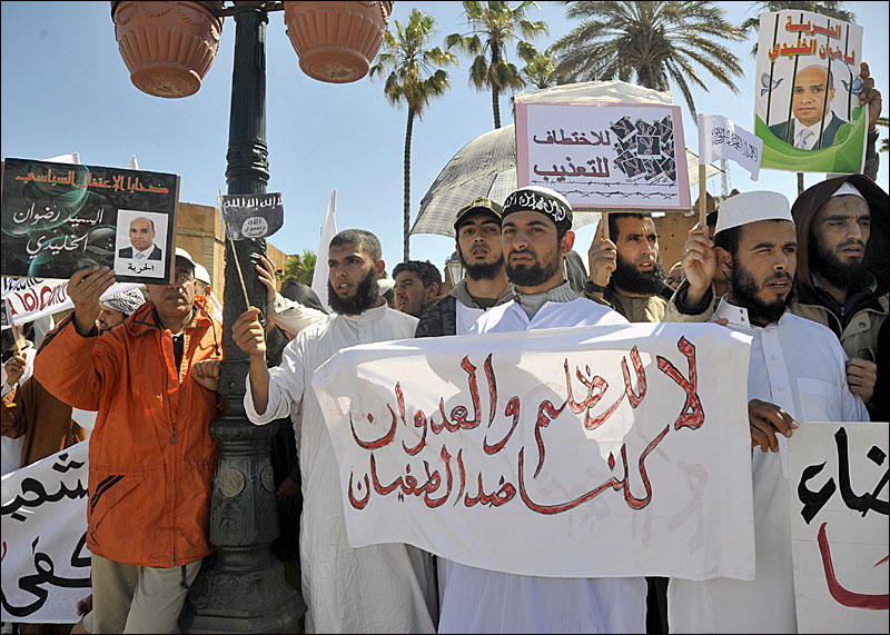 [Imrane Binoual] As part of their new outreach initiative, Moroccan Salafists marched for the first time with February 20th Movement protestors on March 17th. في إطار مبادرتهم التواصلية الجديدة، خرج السلفيون المغاربة للمرة الأولى في مسيرة مع متظاهري حركة 20 فبراير في 17 مارس Dans le cadre de leur nouvelle initiative de communication, les salafistes marocains ont défilé pour la première fois avec les manifestants du Mouvement du 20 février, le 17 mars.